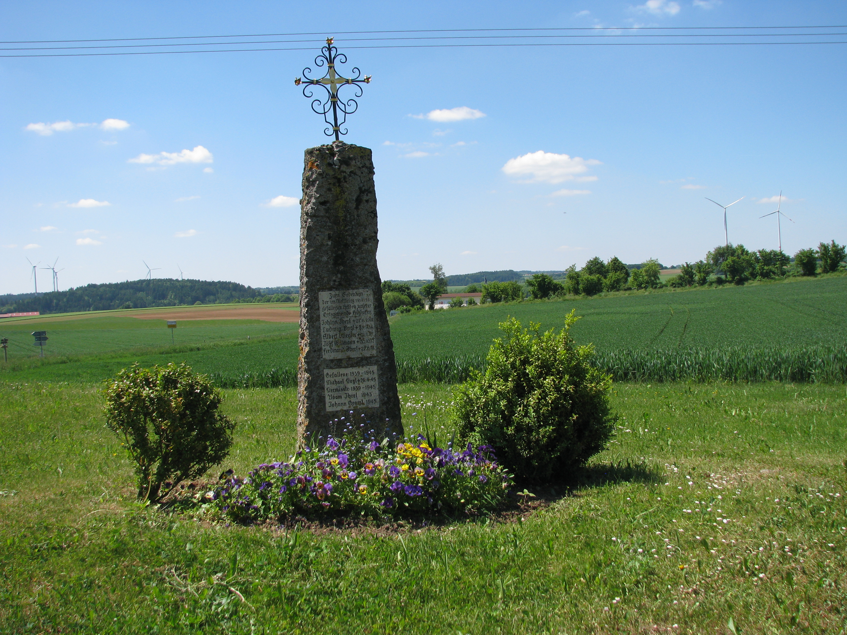 Hilzhofen (Pilsach NM), Gedenkstein für Gefallene